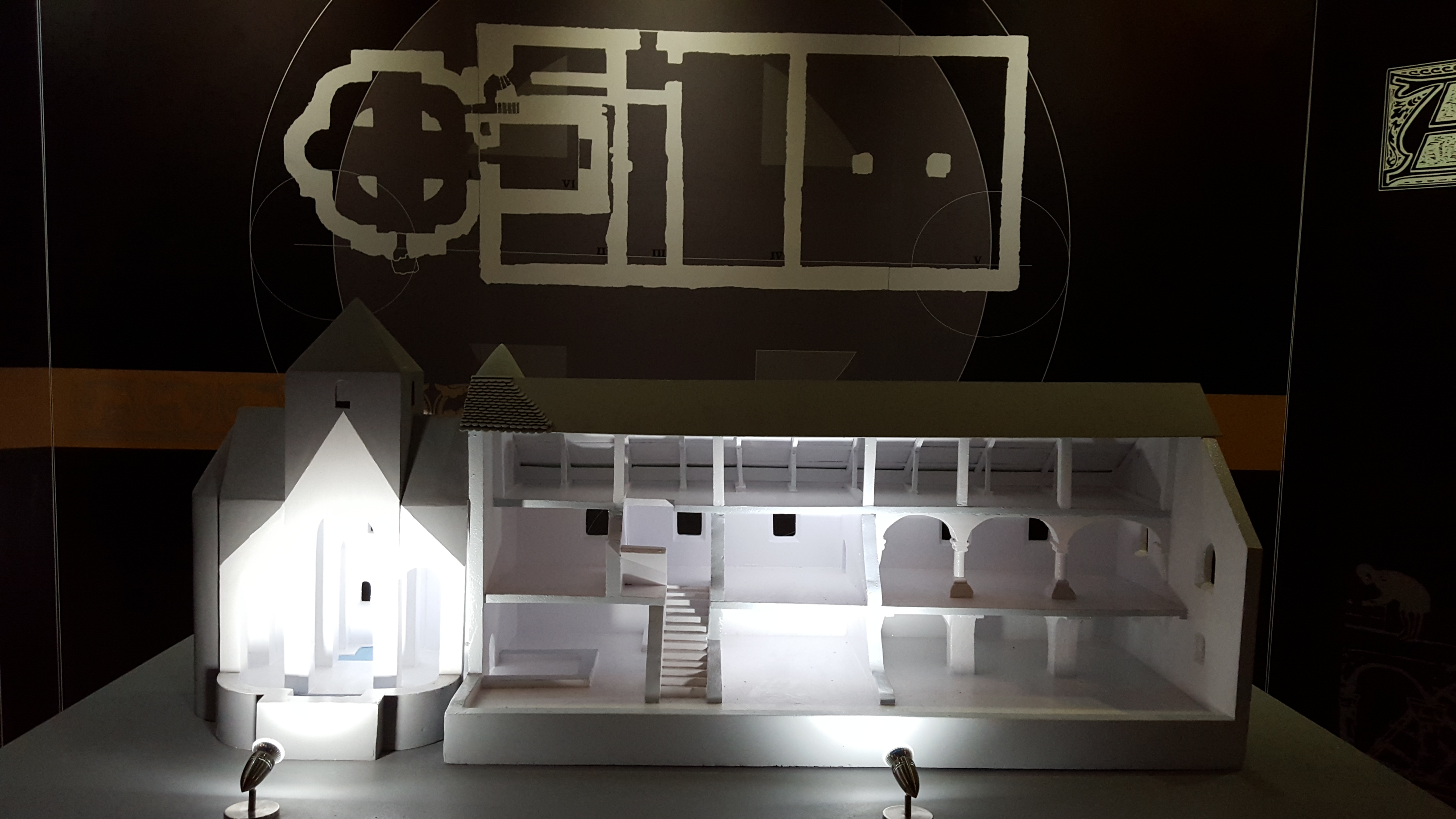 Ostrów Lednicki - plan i makieta palatium z kaplicą chrzcielną prezentowane w Muzeum Pierwszych Piastów